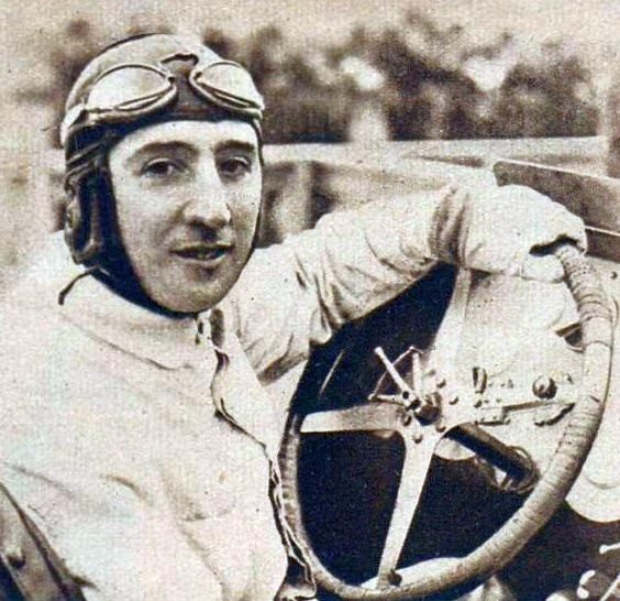 Antoine Mourre au milieu des années 1920, aux USA.